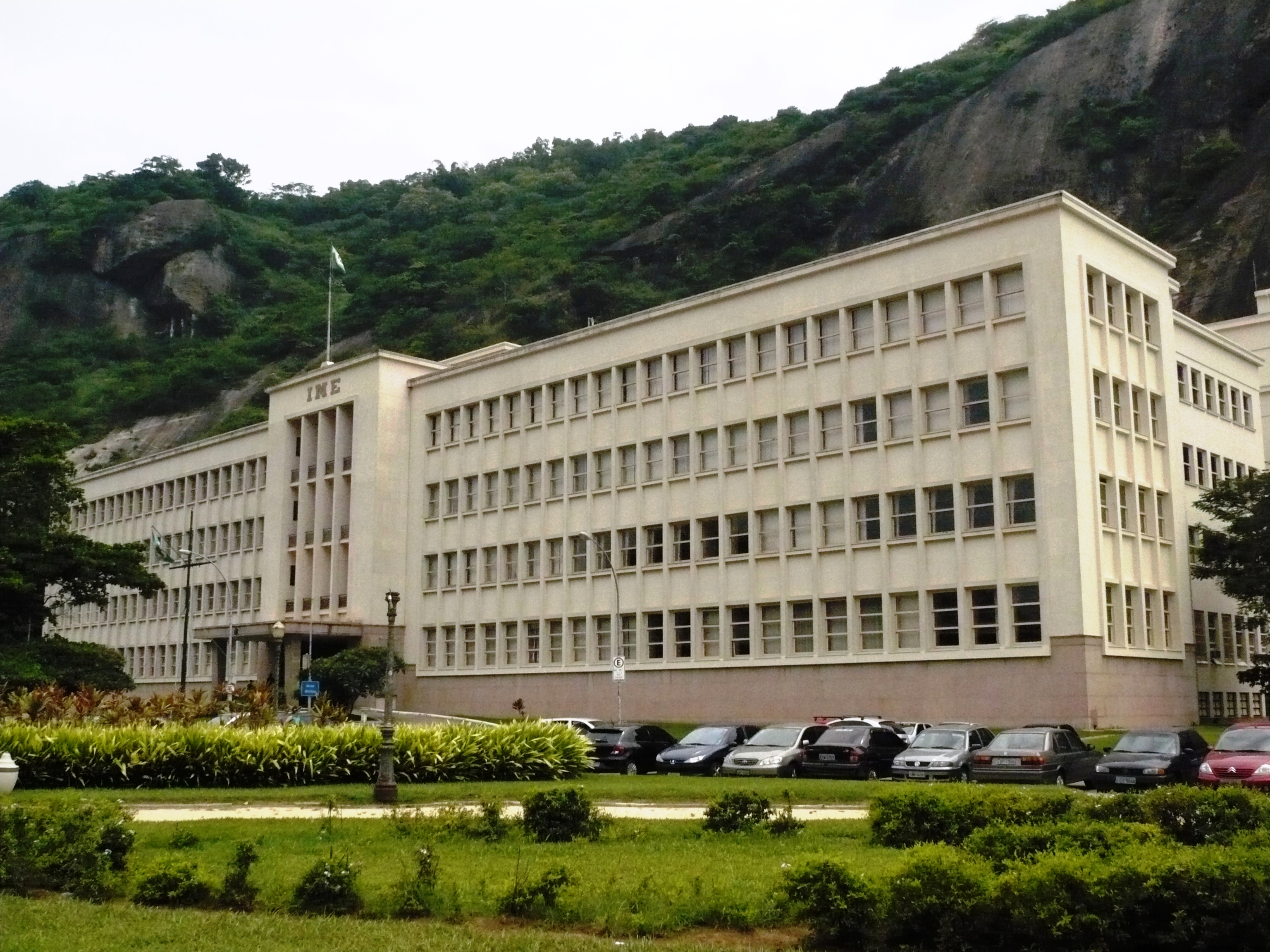 Instituto Militar de Engenharia, Urca, Rio de Janeiro, RJ, Brasil.